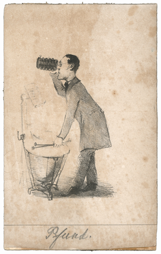 C. Reimers: Das Leipziger Gewandhausorchester im Lichte der Satire, 19 Karikaturen, lithographiert von Blau & Co., Leipzig um 1850 Ernst Gottlob Benjamin Pfundt (1806-1871), Paukist, Erfinder der Maschinenpauke, Neffe von Friedrich Wieck und Cousin von Clara Schumann